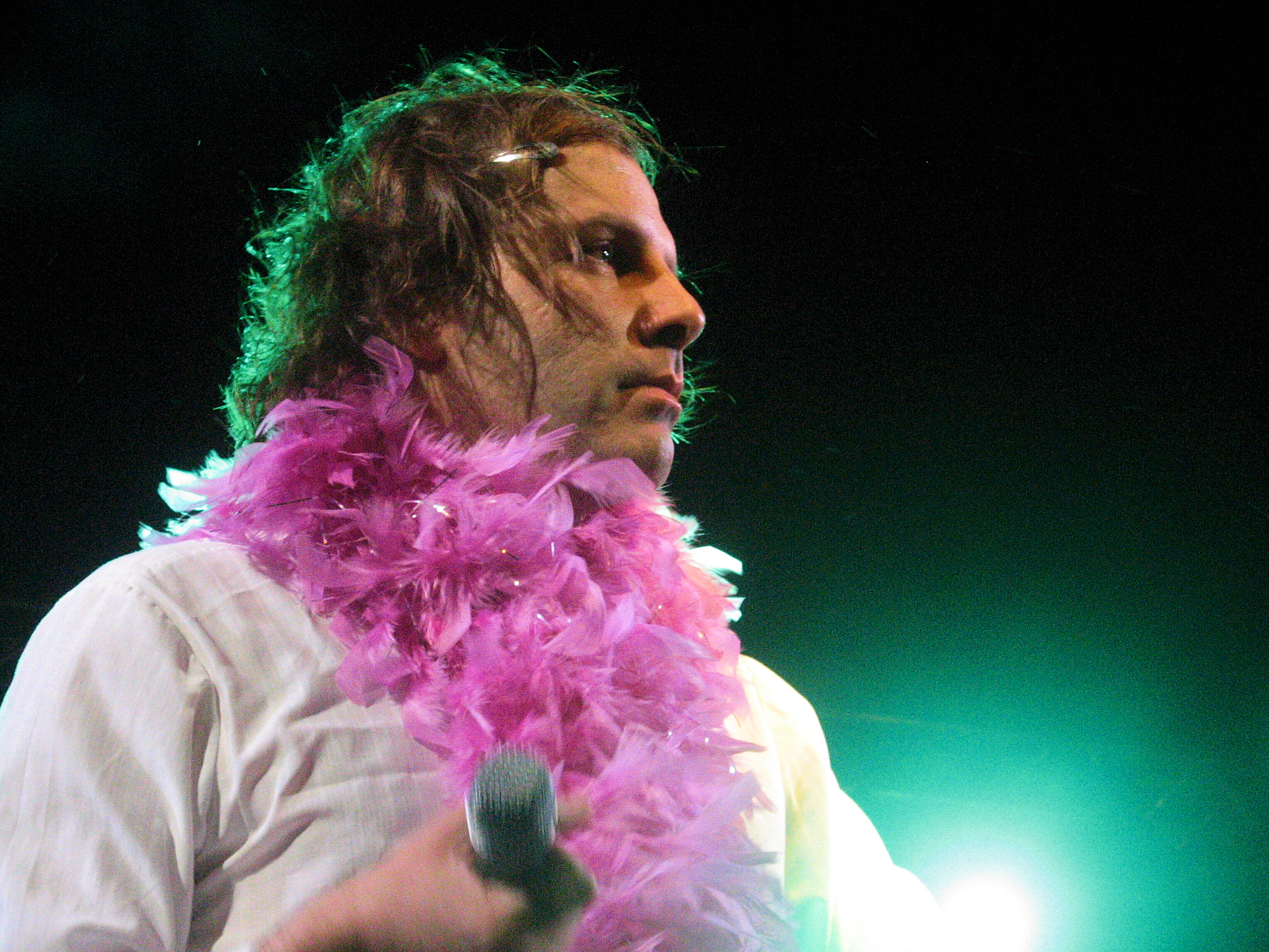 Le chanteur Philippe Katerine (en concert aux Sables d'Olonne le 21 juin 2006). D'autres photos du même concert sous licence CC-BY-SA disponibles ici. French singer Philippe Katerine (live in Les Sables d'Olonne, june 21st 2006). More pictures from the same show and under CC-BY-SA licence are available here.